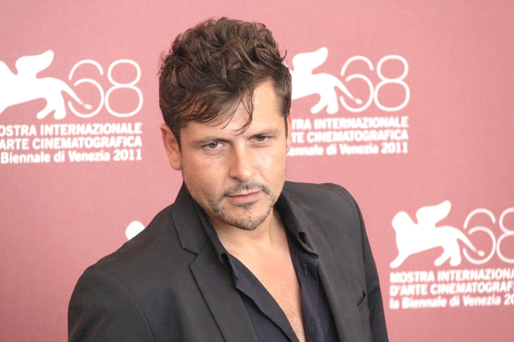 Kike Maíllo, presentación de "EVA" en el Festival de Venecia